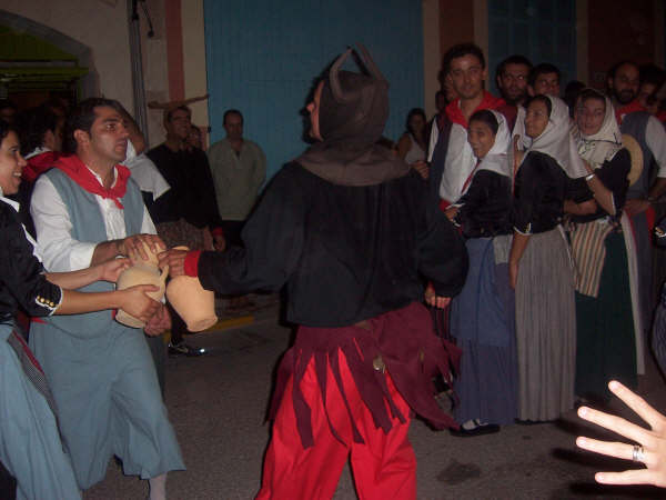 Imatge de la festa de la Beata a Santa Margalida (Mallorca)